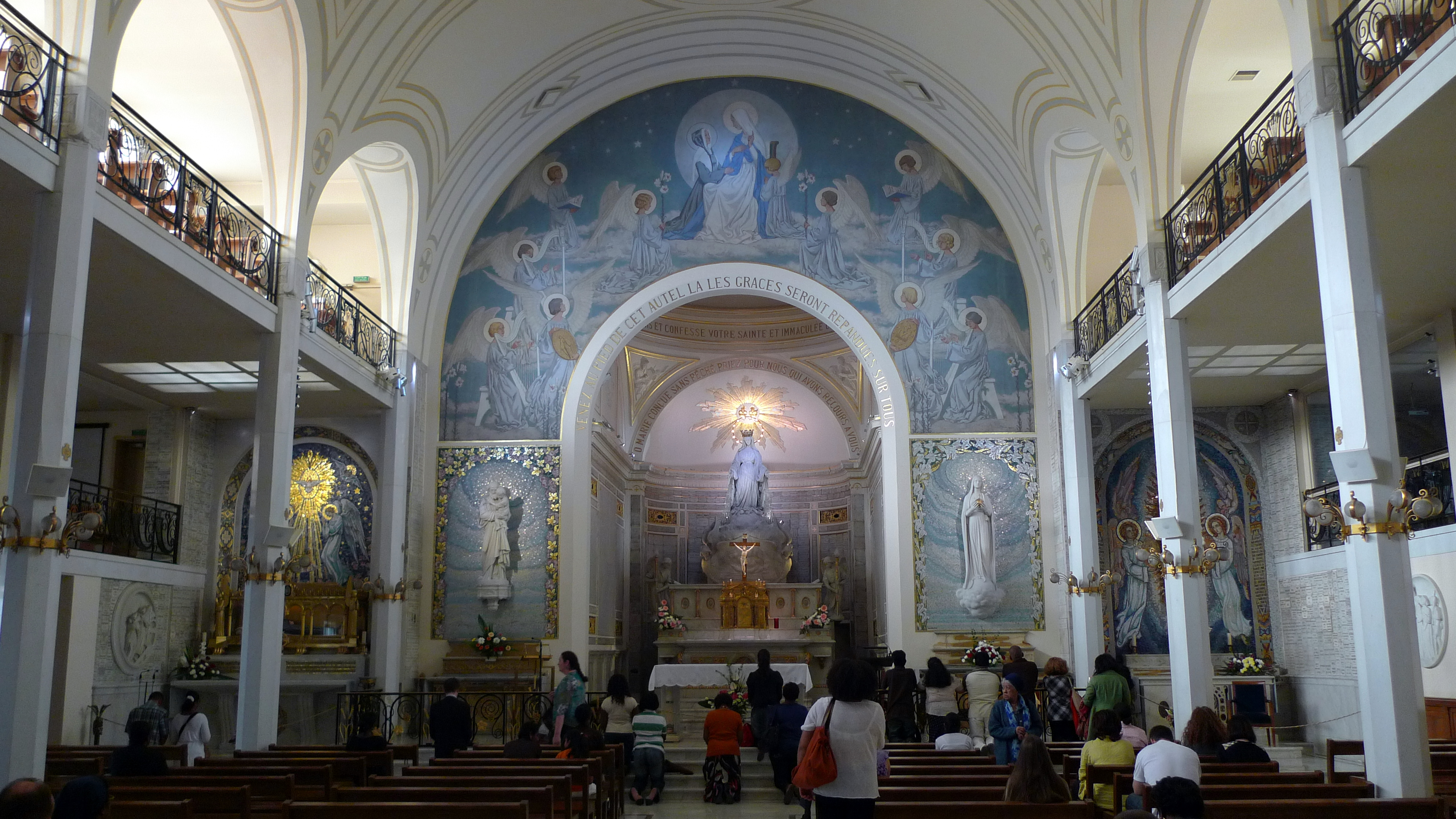 chapelle de la rue du Bac (PARIS,FR75)